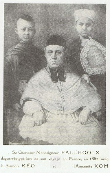 Monseigneur Pallegoix posant avec un garçon siamois et une fille annamite.